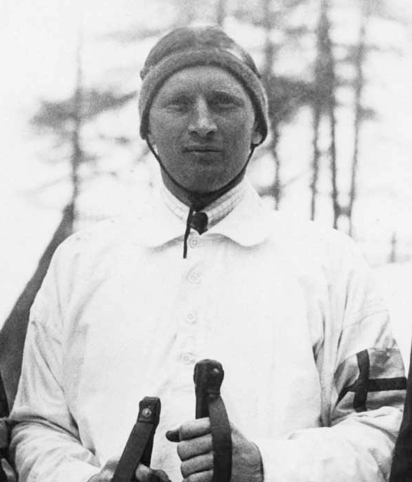 Per-Erik Hedlund, Saint-Moritz 1928